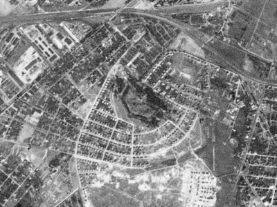 Fort IX Twierdzy Poznań sfotografowany przez satelitę KH-4A 1023, 23 sierpnia 1965 r.